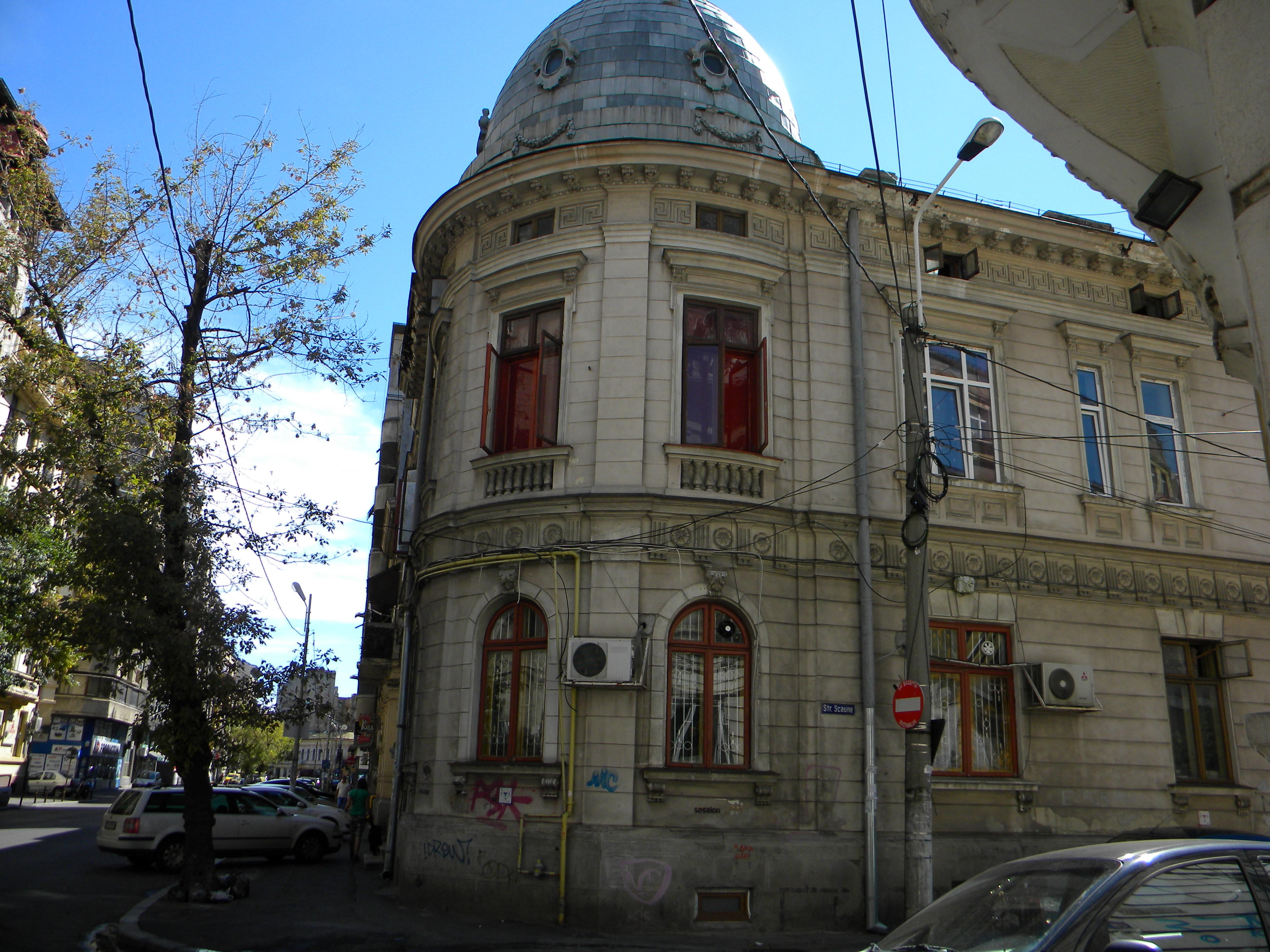 Bucuresti, Romania, Strada Hristo Botev nr. 6 (imobil) sect. 3